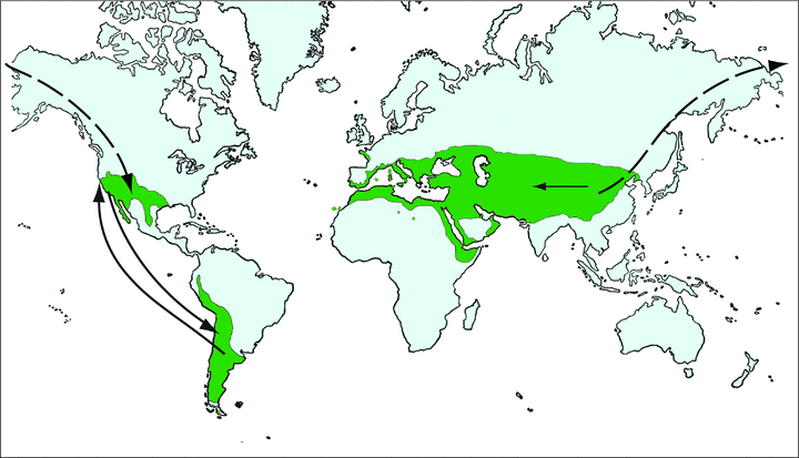 Imagem extraída de Ickert-Bond et al (2009). Hipótese de dispersão de Ephedra intercontinental (setas inteiras) e intracontinental (setas tracejadas).